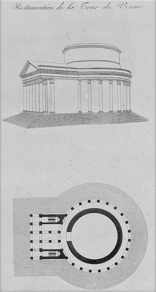 Périgueux - Tour de Vésone - Proposition de restauration du temple faite par le comte Wlgrin de Taillefer dans "Les antiquités de Vésone", tome 1, planche IV (1821)